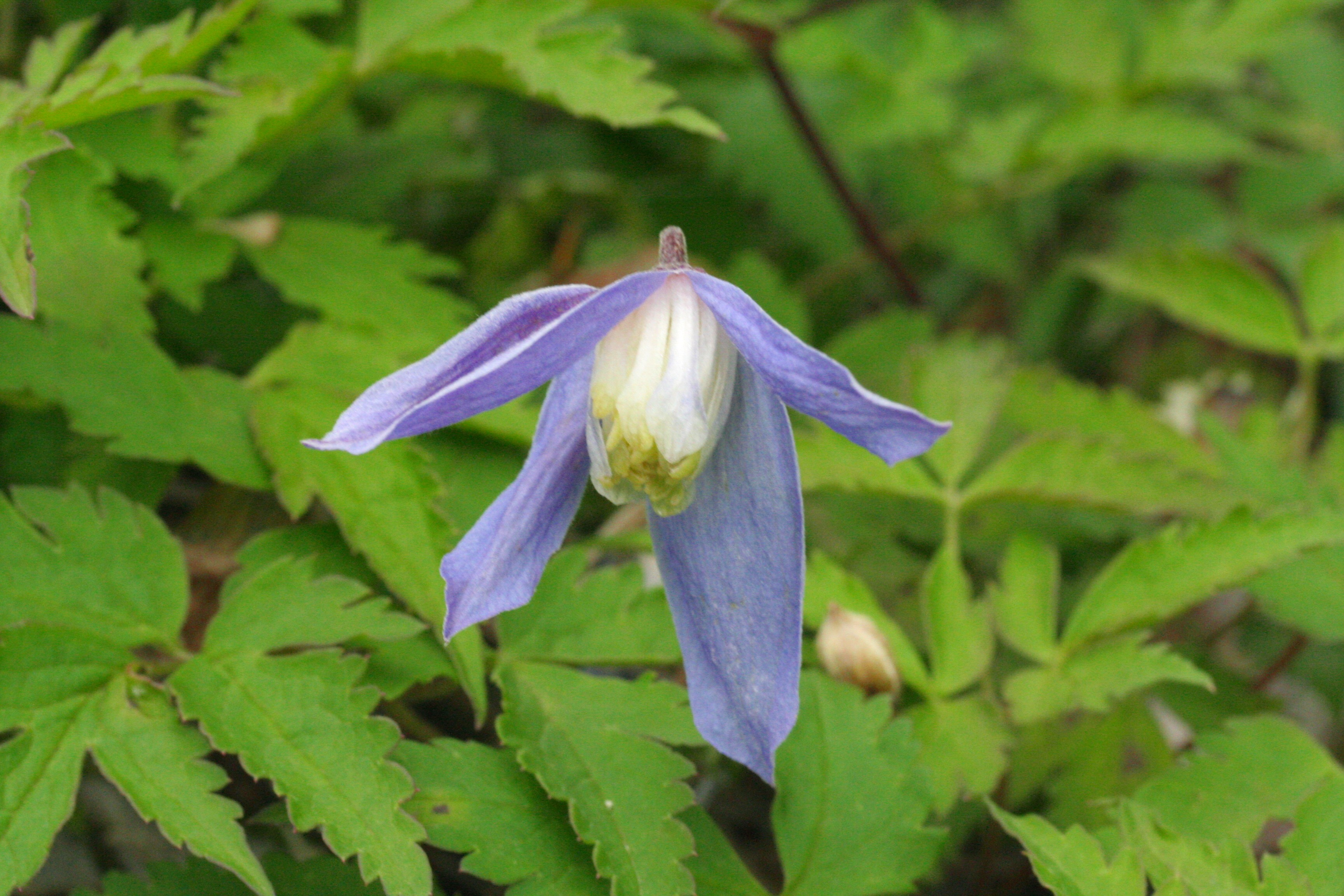 Clematis_alpina (Clematide alpina) "Giardino Botanico delle Alpi Orientali" (loc. Monte Faverghera) Belluno, quota 1500 m s.l.m.